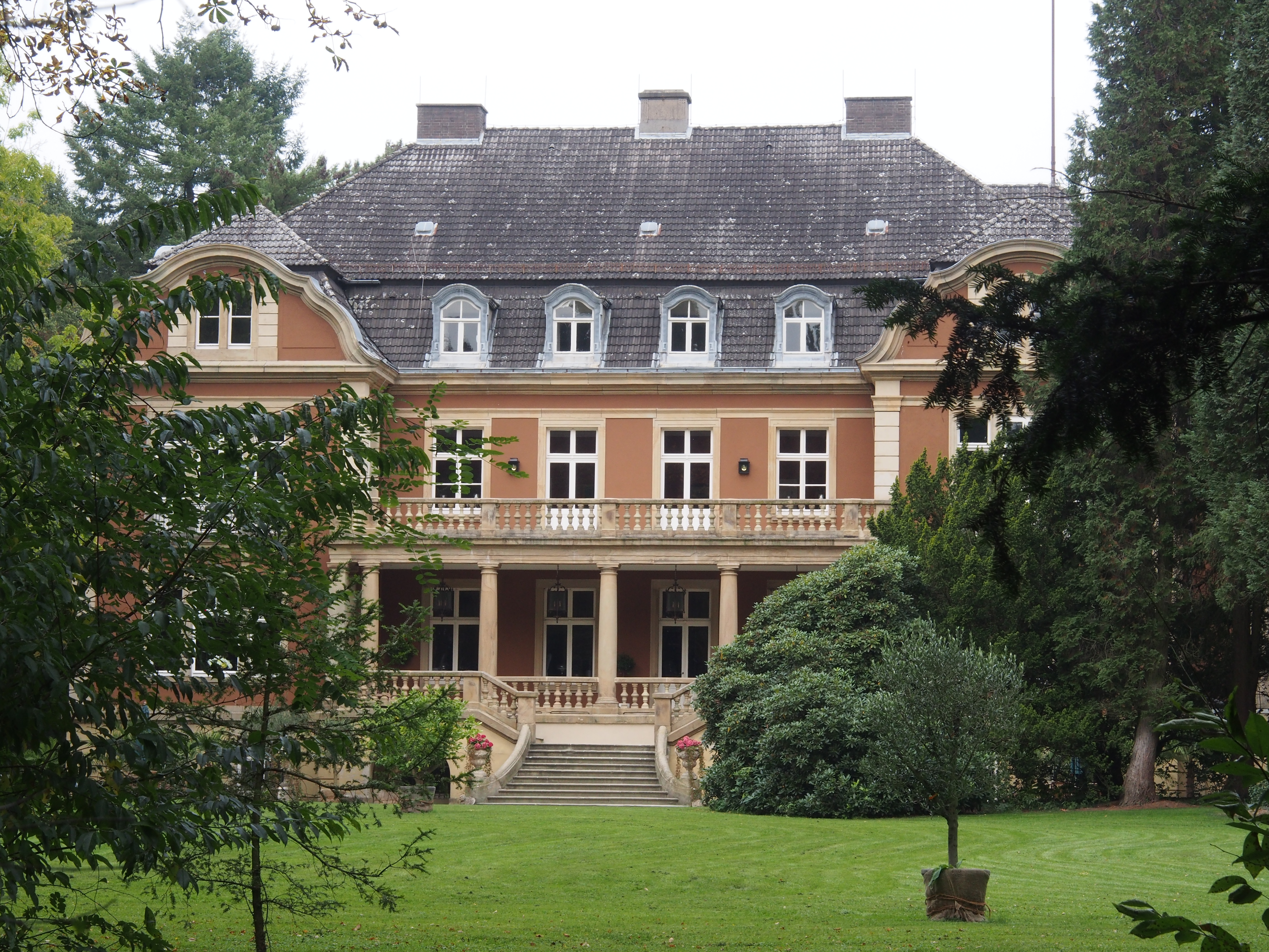 Schloss in Eldingen, Niedersachsen (Germany)